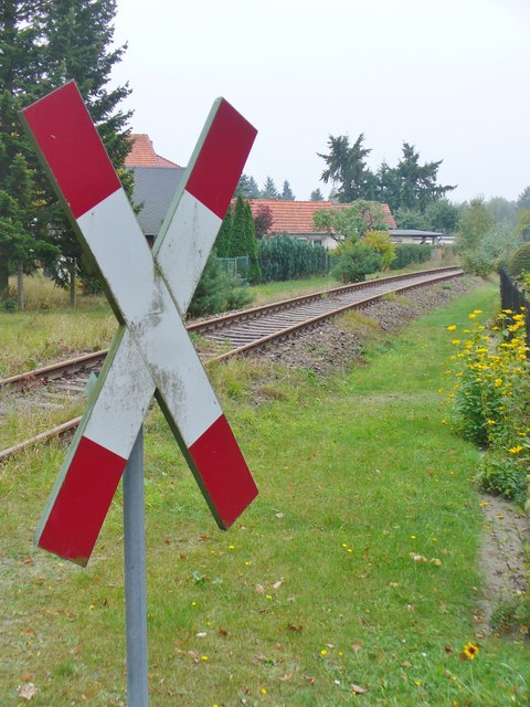 Krummensee - Bahnstrecke (Railway Line)